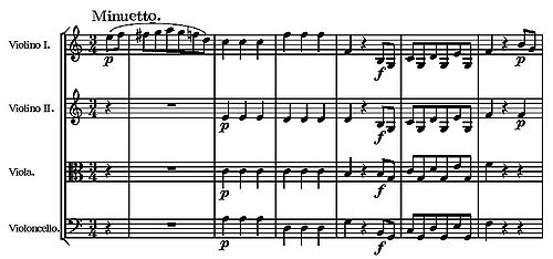 3er movimiento del Cuarteto de cuerda n.º 19 (Mozart)